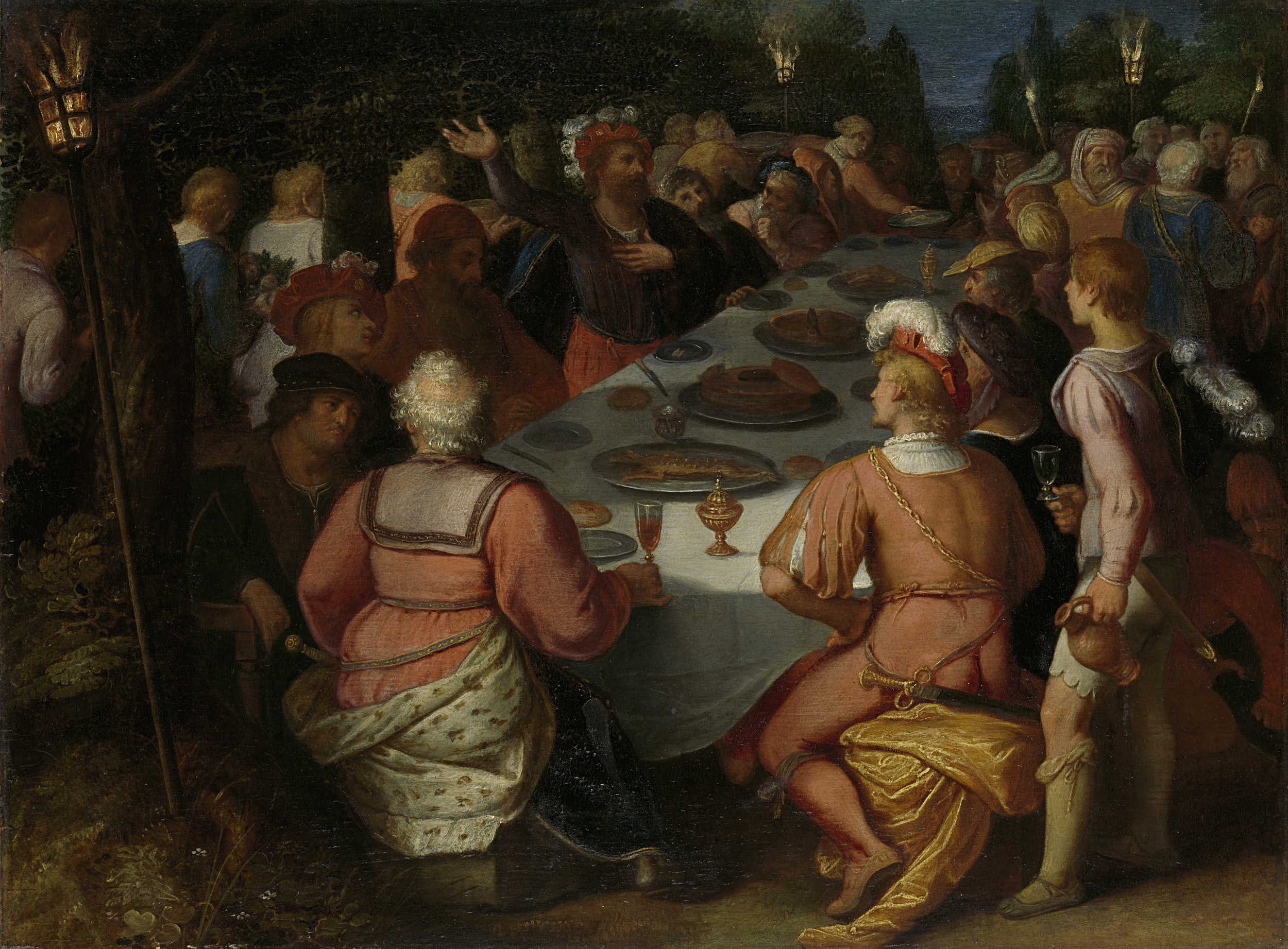 De samenzwering van Claudius Civilis met de Bataven in het Schakerbos. Claudius Civilis met medestanders gezeten aan een maaltijd aan een lange tafel in het bos bij nacht. Tweede voorstelling in een reeks van twaalf taferelen van de opstand van de Batavieren tegen de Romeinen (SK-A-421/432), aangekocht door de Staten-Generaal in 1613.